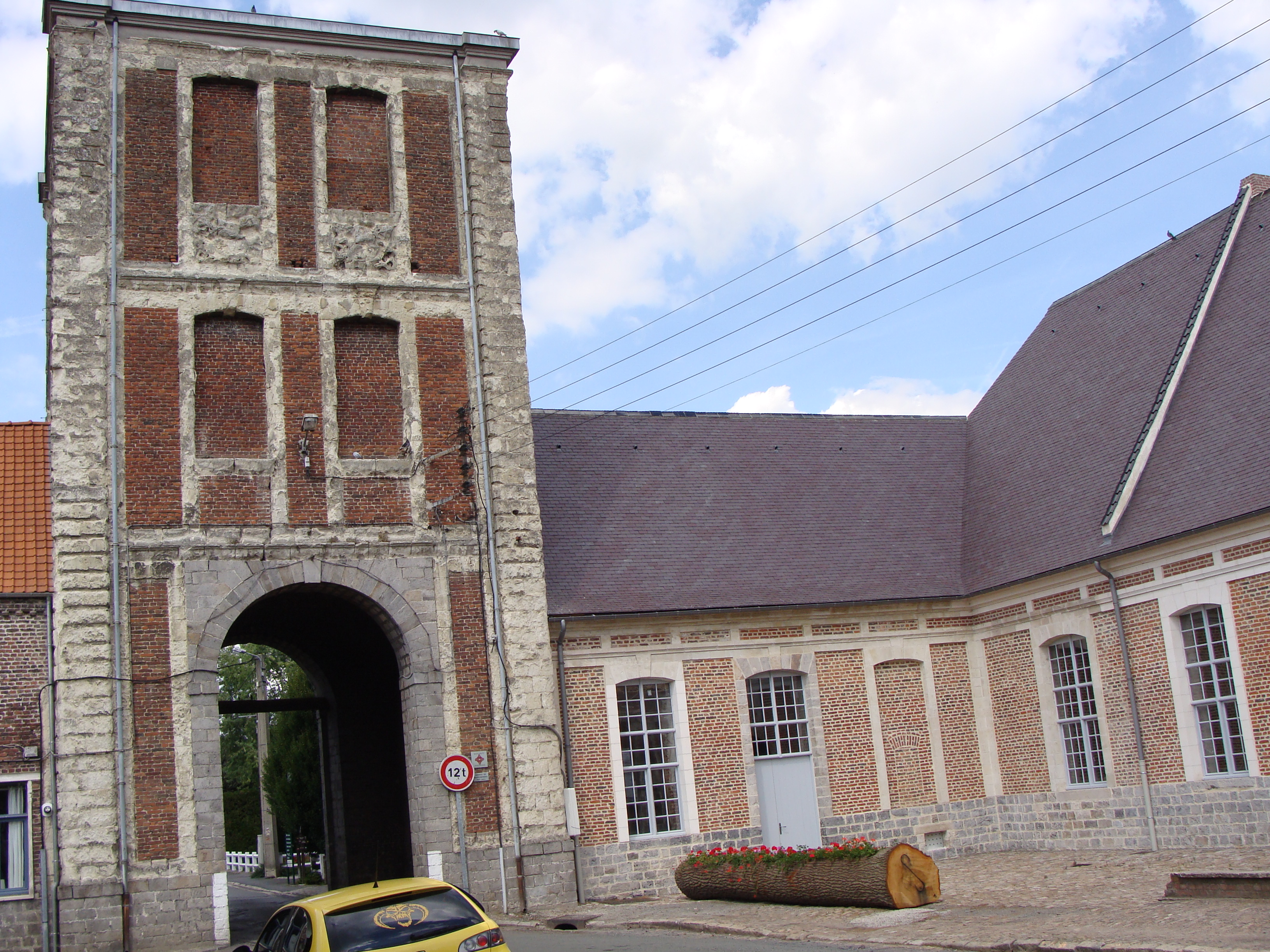 Marchiennes - ancienne brasserie Dufour